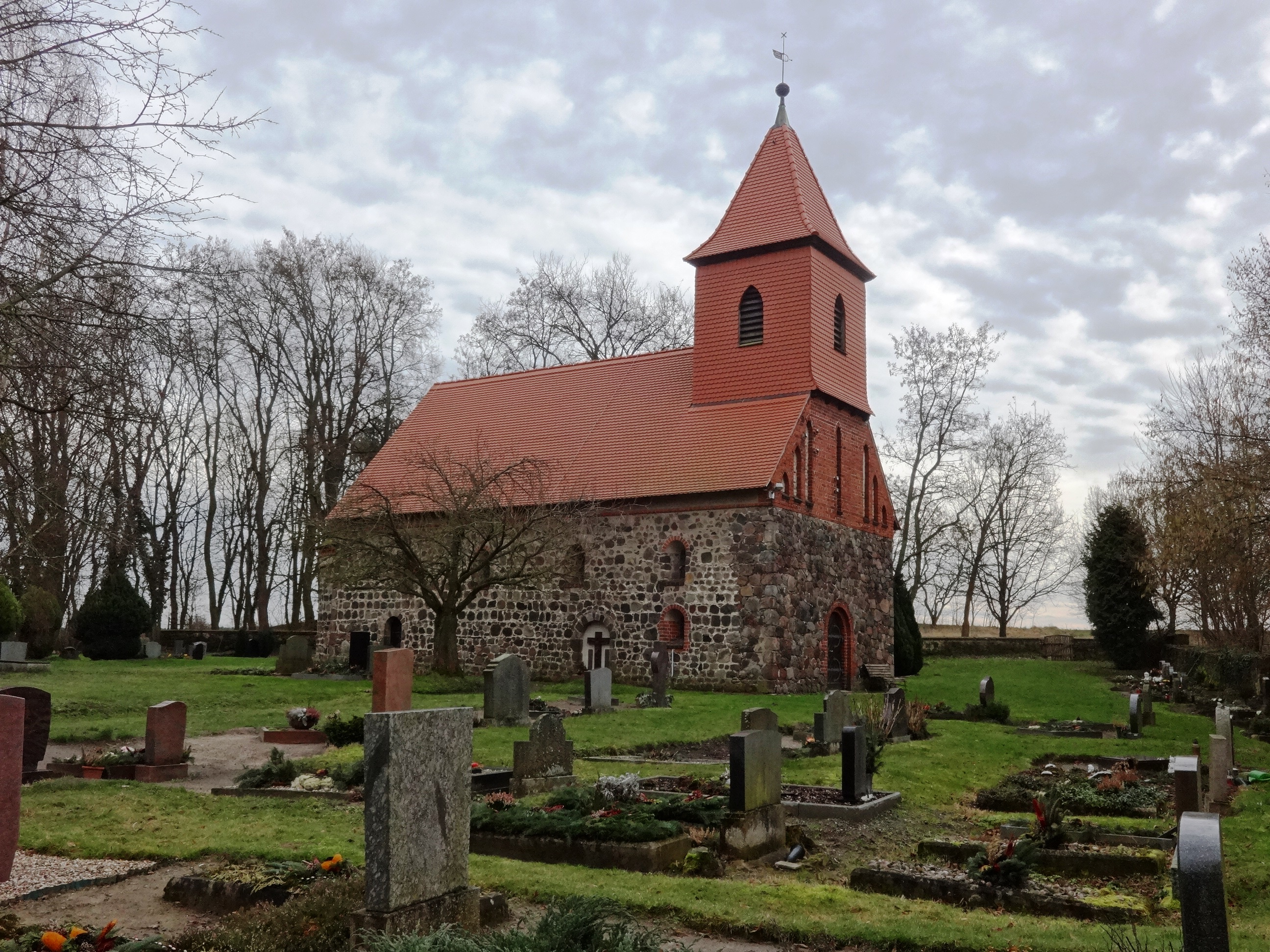 Die Dorfkirche Rädigke ist eine Feldsteinkirche, die vermutlich Ende des 12. Jahrhunderts oder Anfang des 13. Jahrhunderts entstand. 1858 erfolgte eine Renovierung des Innenraums; 1903 wurden die Fenster am Kirchenschiff vergrößert. Im Innern befinden sich ein Altarretabel aus dem Jahr 1690 sowie eine Kanzel aus dem Jahr 1703.